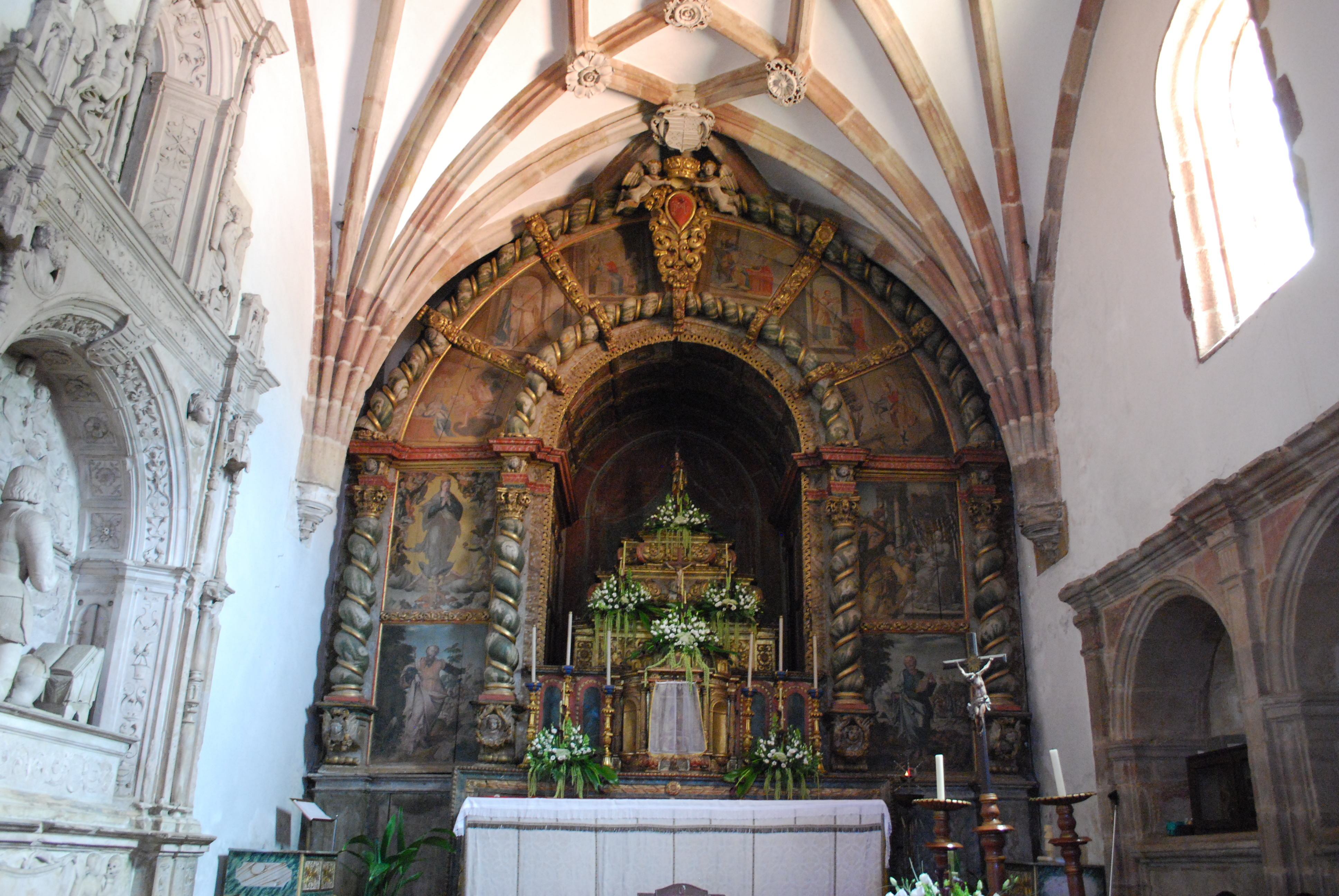 Igreja de Góis ou Igreja de Santa Maria Maior incluindo o túmulo do Conde de Sortelha (na esquerda) This file was uploaded for Wiki Loves Monuments in Portugal with the unique identifier 70290.